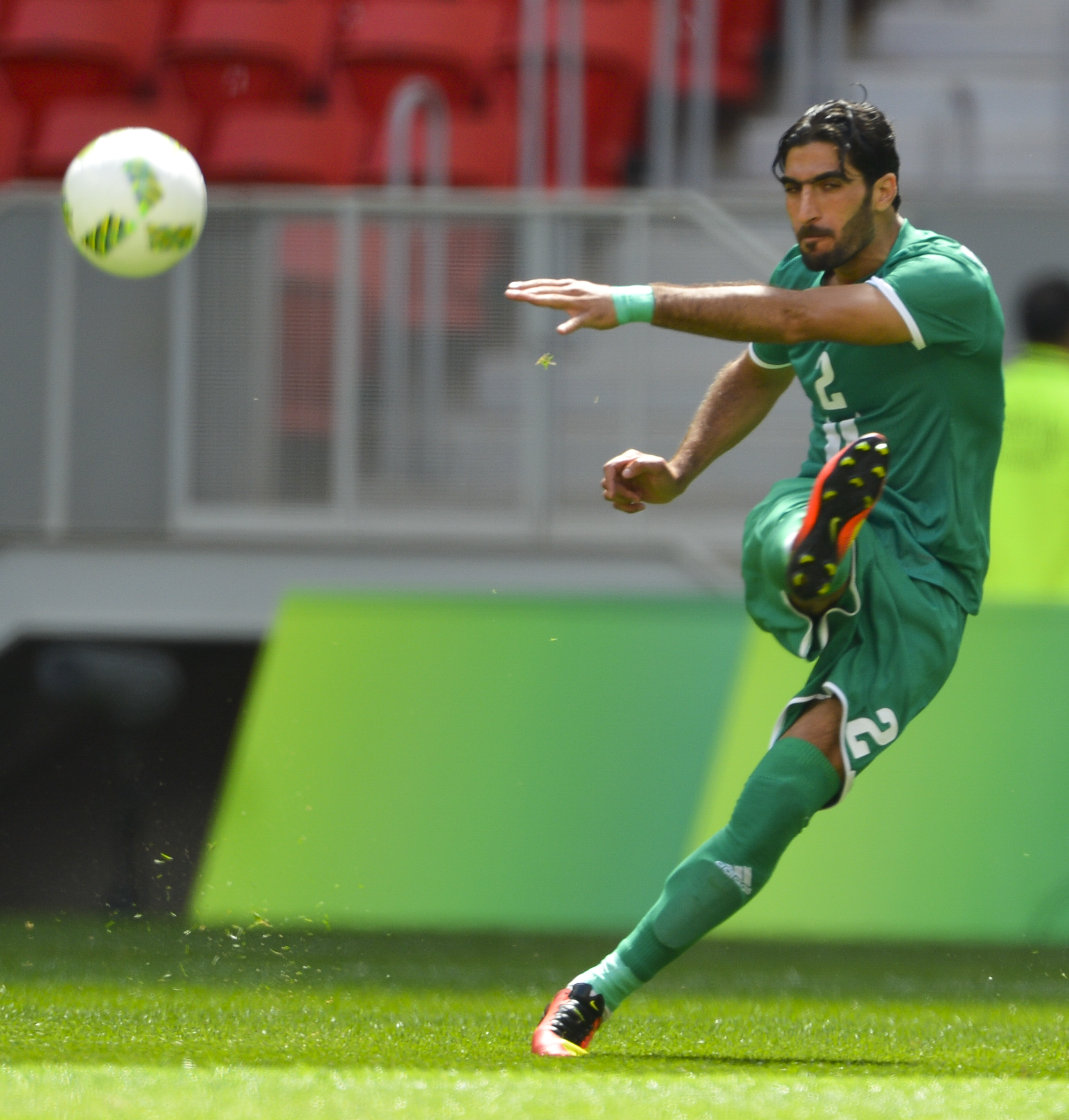 Brasília - A seleção do Iraque enfrenta a seleção da Dinamarca pela primeira fase do futebol olímpico, no estádio Mané Garrincha ( Marcelo Camargo/Agência Brasil)